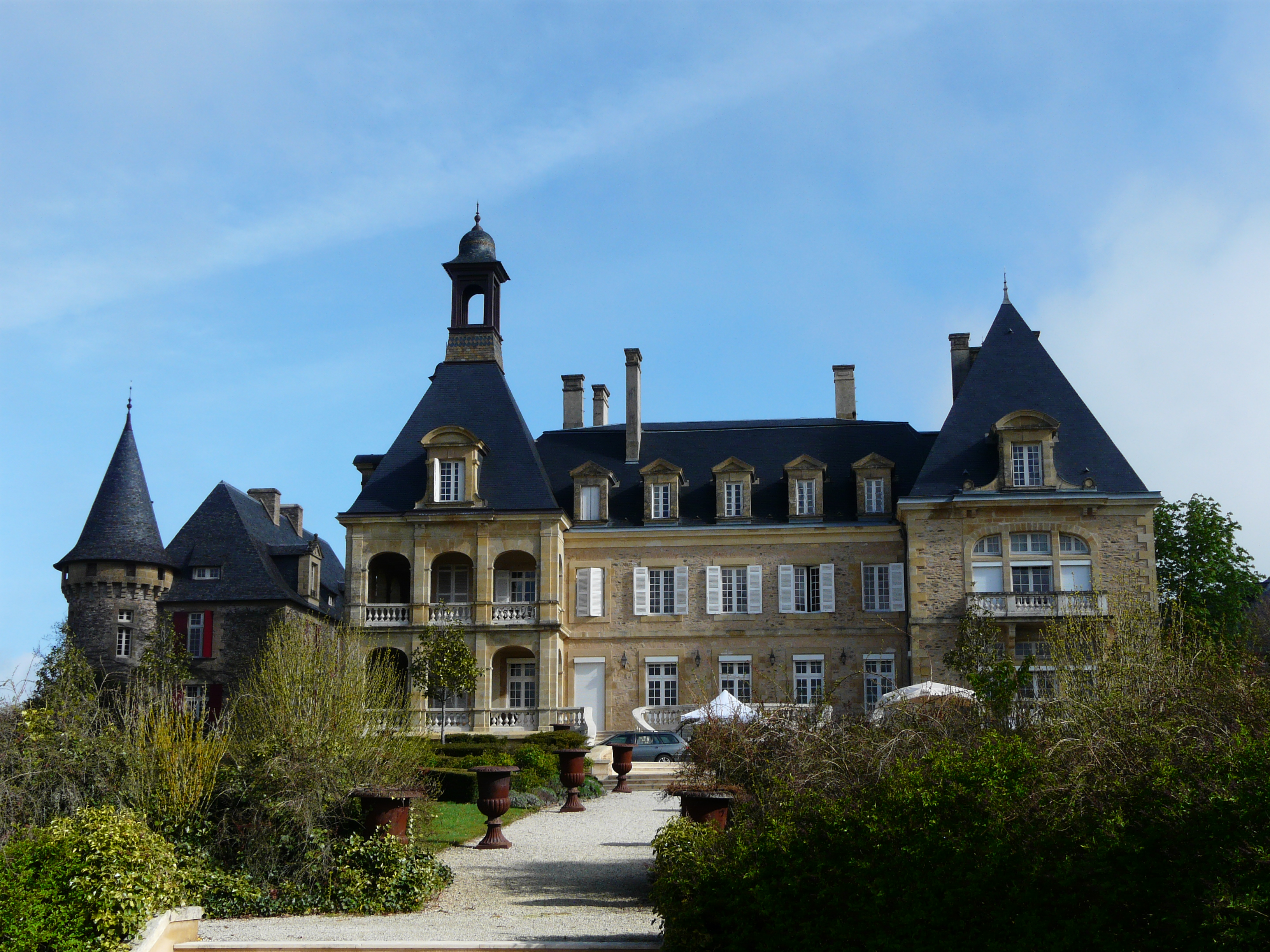 Les deux châteaux d'Essendiéras : à gauche l'ancien manoir, au centre le nouveau castel. Saint-Médard-d'Excideuil, Dordogne, France.